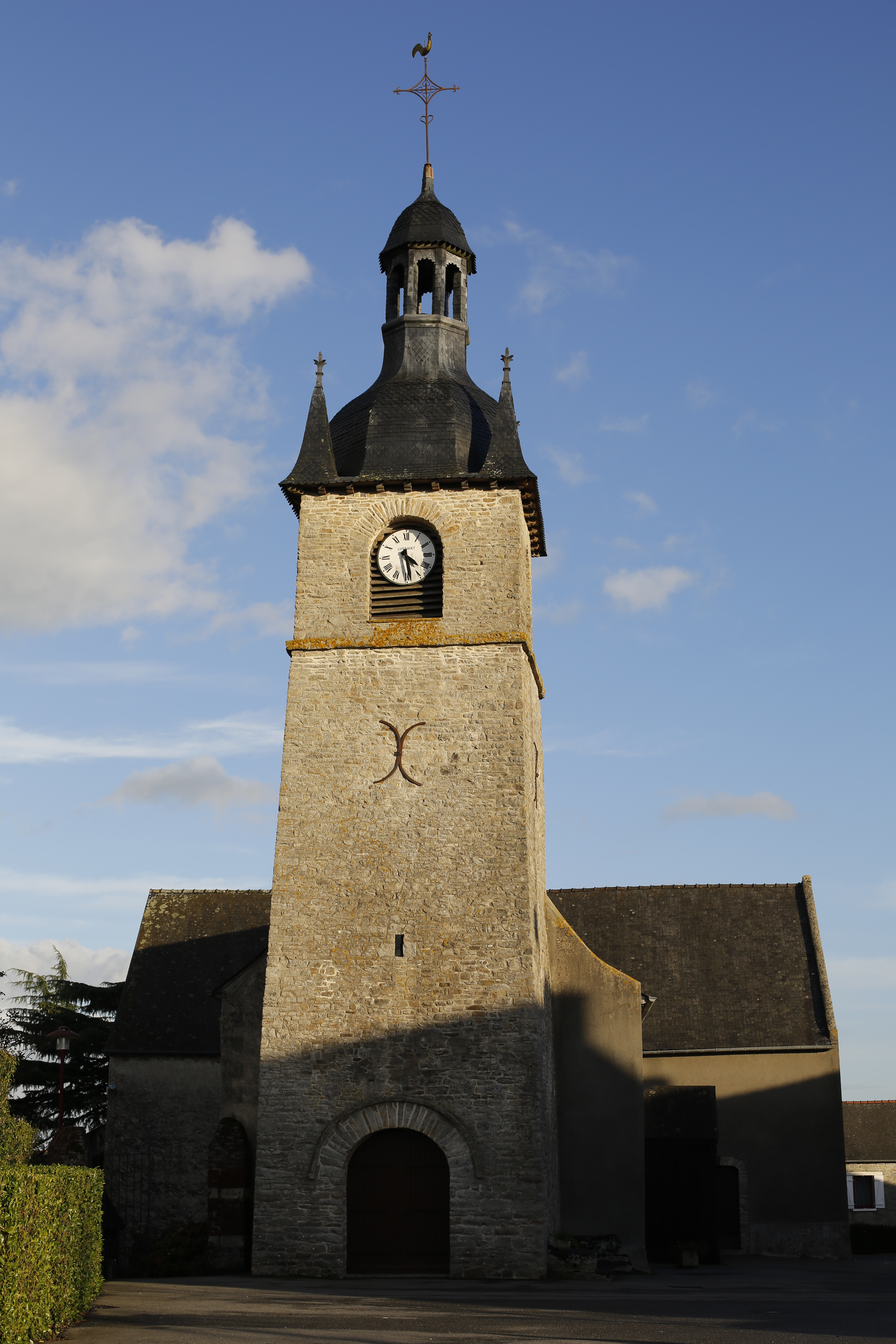 Église de La Couyère (Ille-et-Vilaine, Bretagne, France).